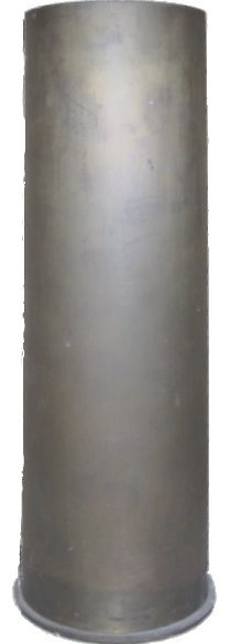 Artilleriekartusche 120 mm.